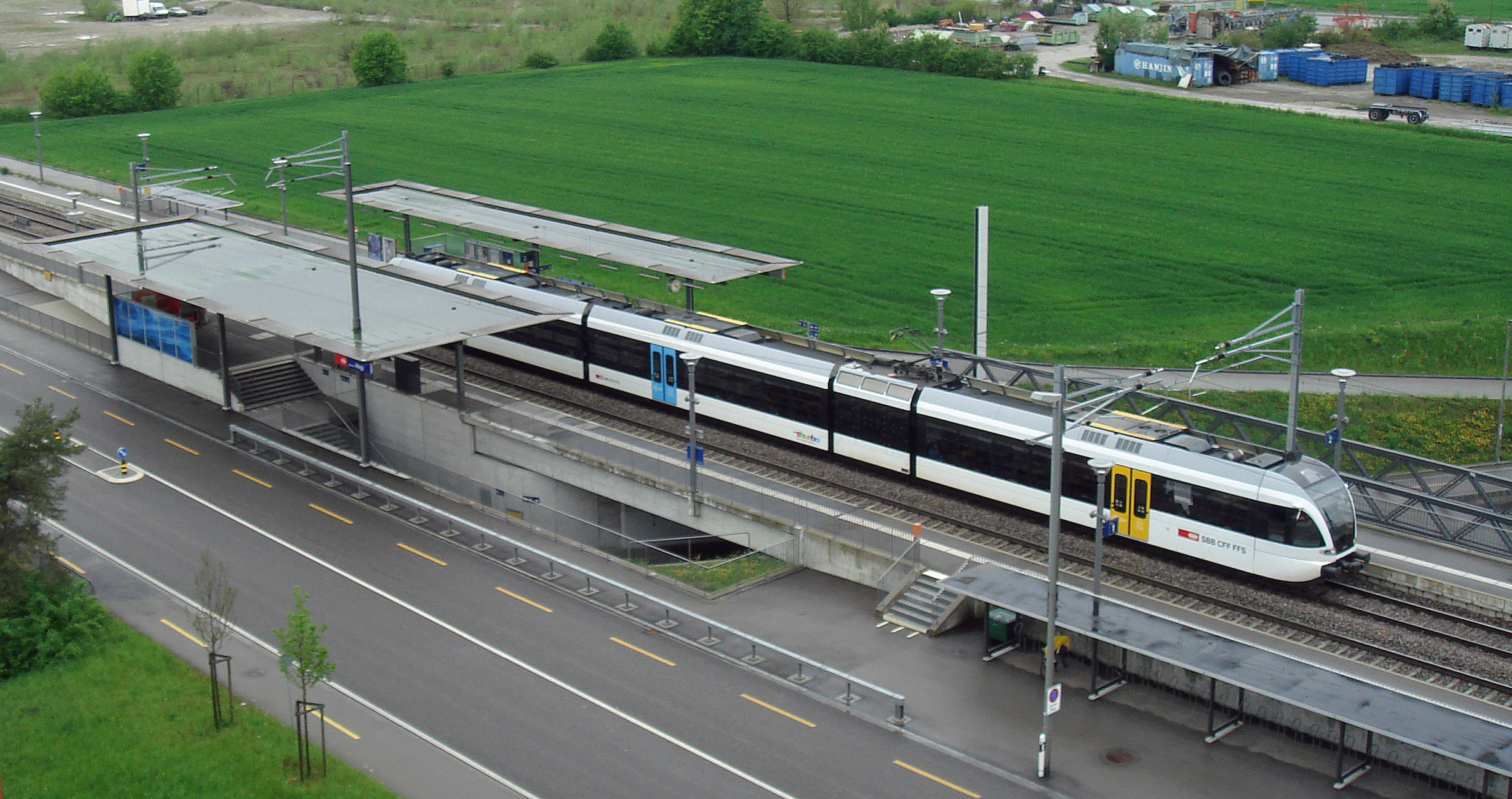 Bahnhof Winterhur Hegi, Schweiz